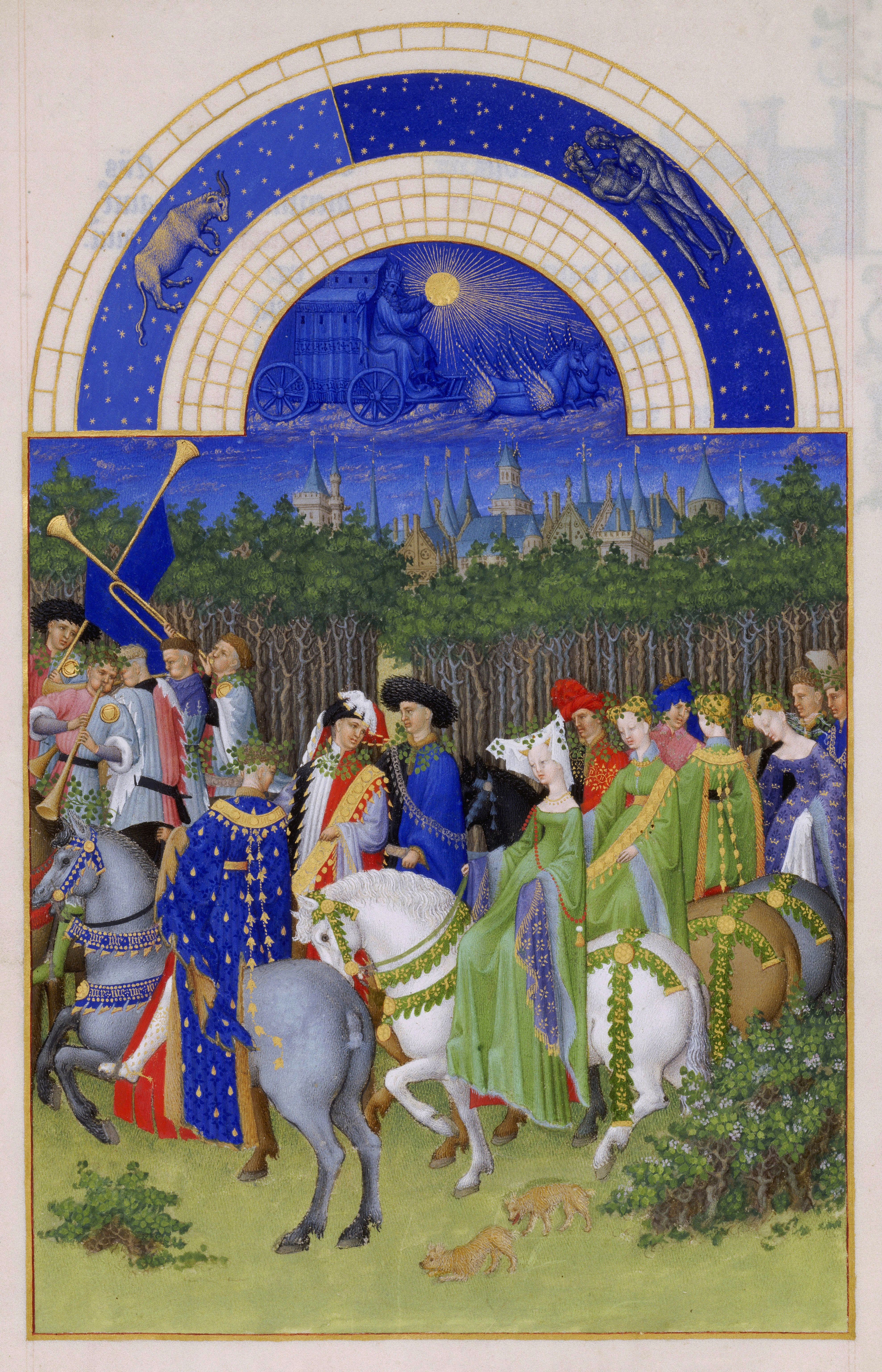 Ce mois est illustré par la cavalcade traditionnelle du 1er mai : des jeunes gens vont à cheval, précédés de joueurs de trompettes. Ils partent en forêt chercher des rameaux qu'ils porteront sur la tête ou autour du cou. À cette occasion, les dames arborent une longue robe verte, comme c'est ici le cas de trois d'entre elles. Plusieurs personnages portent des feuillages dans leur coiffure. Les constructions de l'arrière-plan ont donné lieu à des interprétations divergentes. Il pourrait s'agir du palais de la Cité à Paris avec le Châtelet à gauche, la Conciergerie et la tour de l'Horloge.